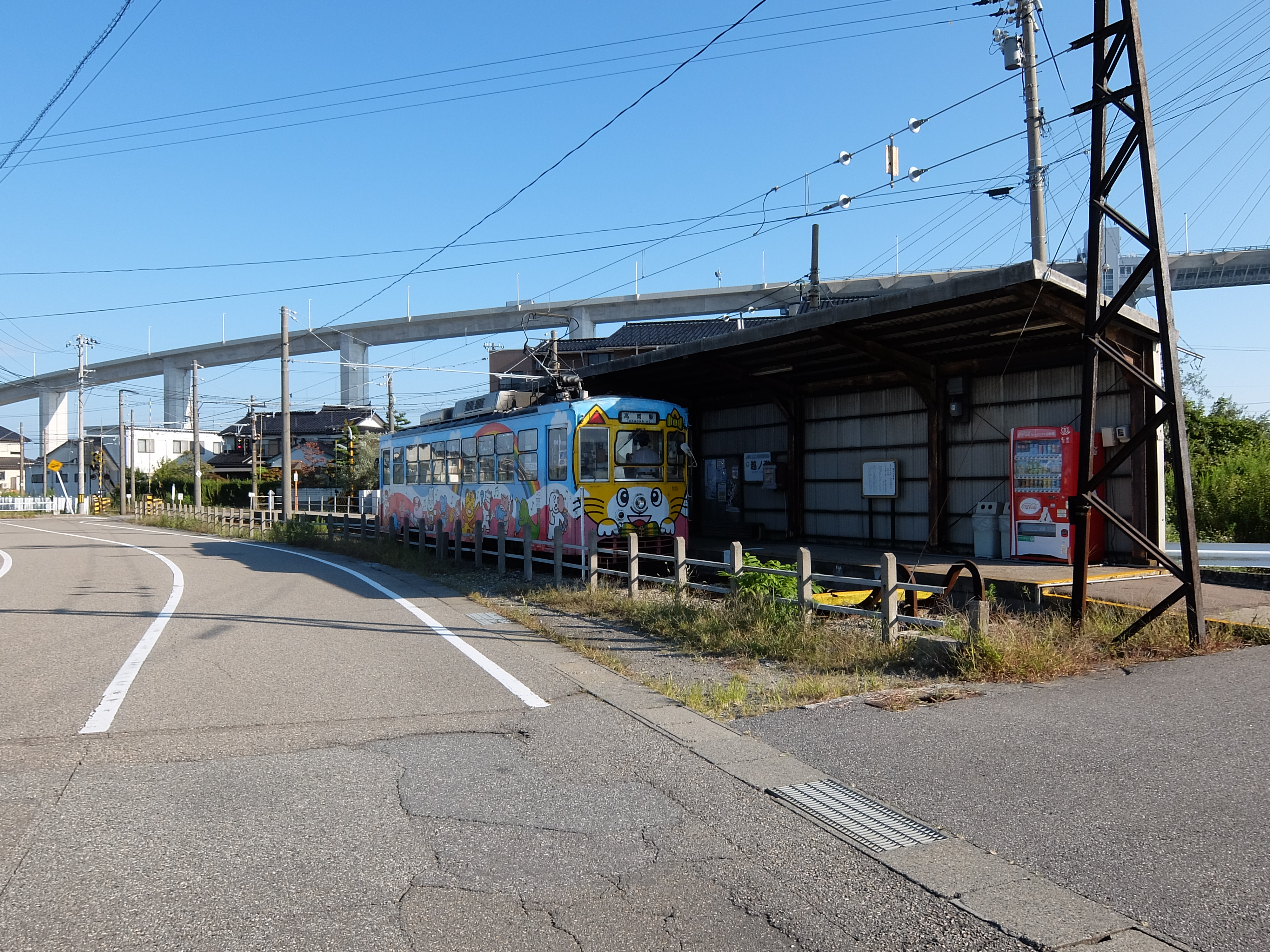 万葉線新湊港線 越ノ潟駅